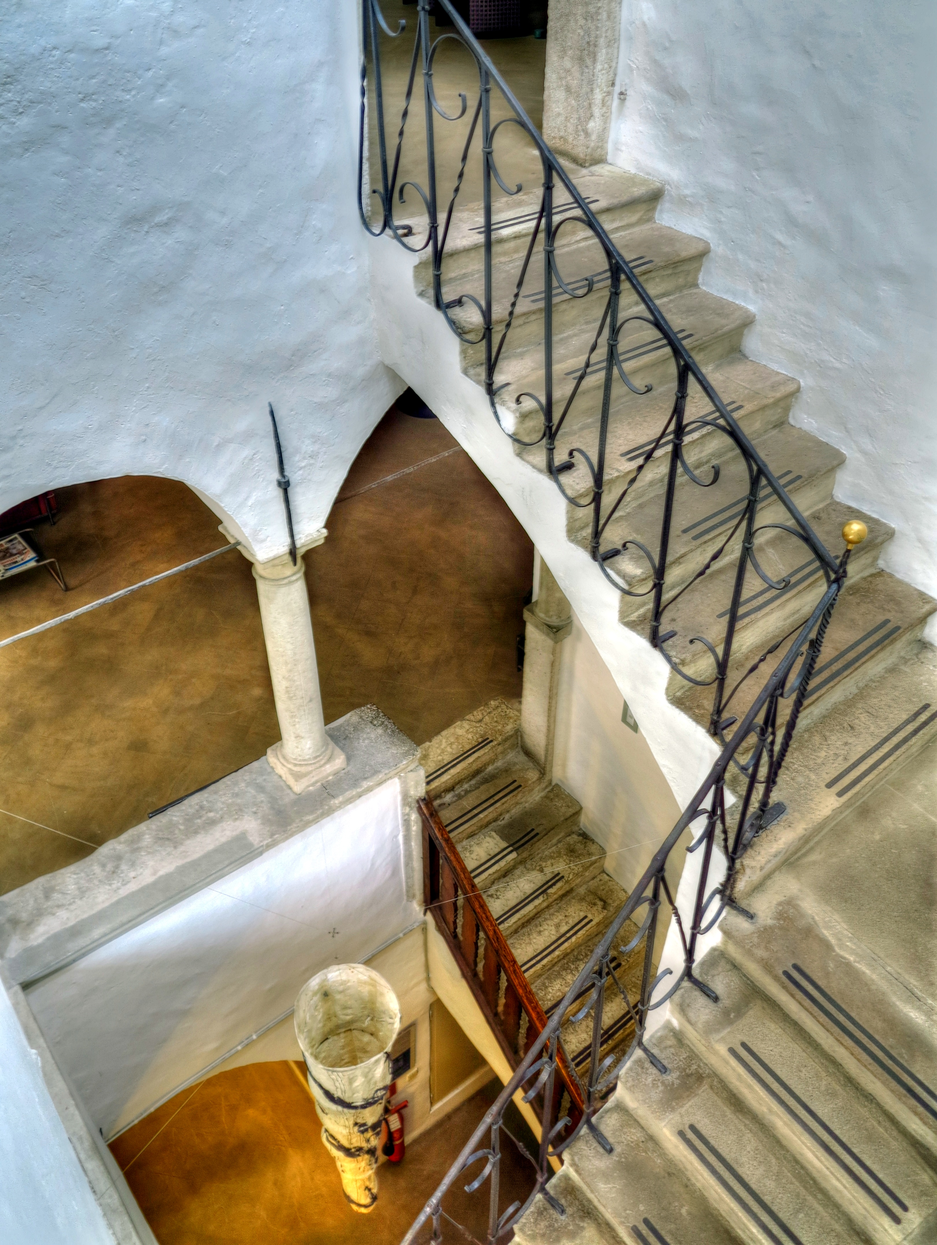 Italien, Südtirol, Neumarkt (Egna), Bezirksgemeinschaft Überetsch-Unterland, Lauben 26, im Peter Garnell Haus